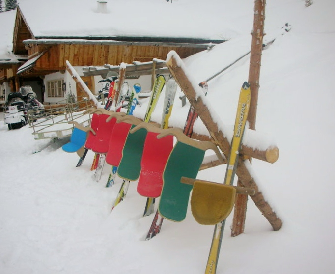 Böckl